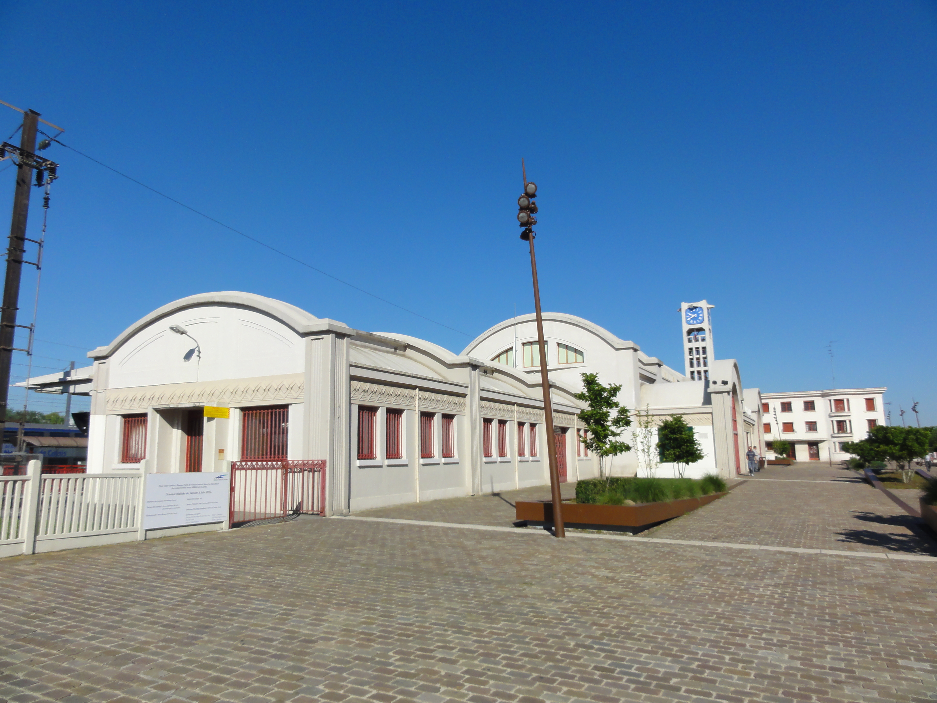 Gare de Lens, Pas-de-Calais, Nord-Pas-de-Calais, France. .